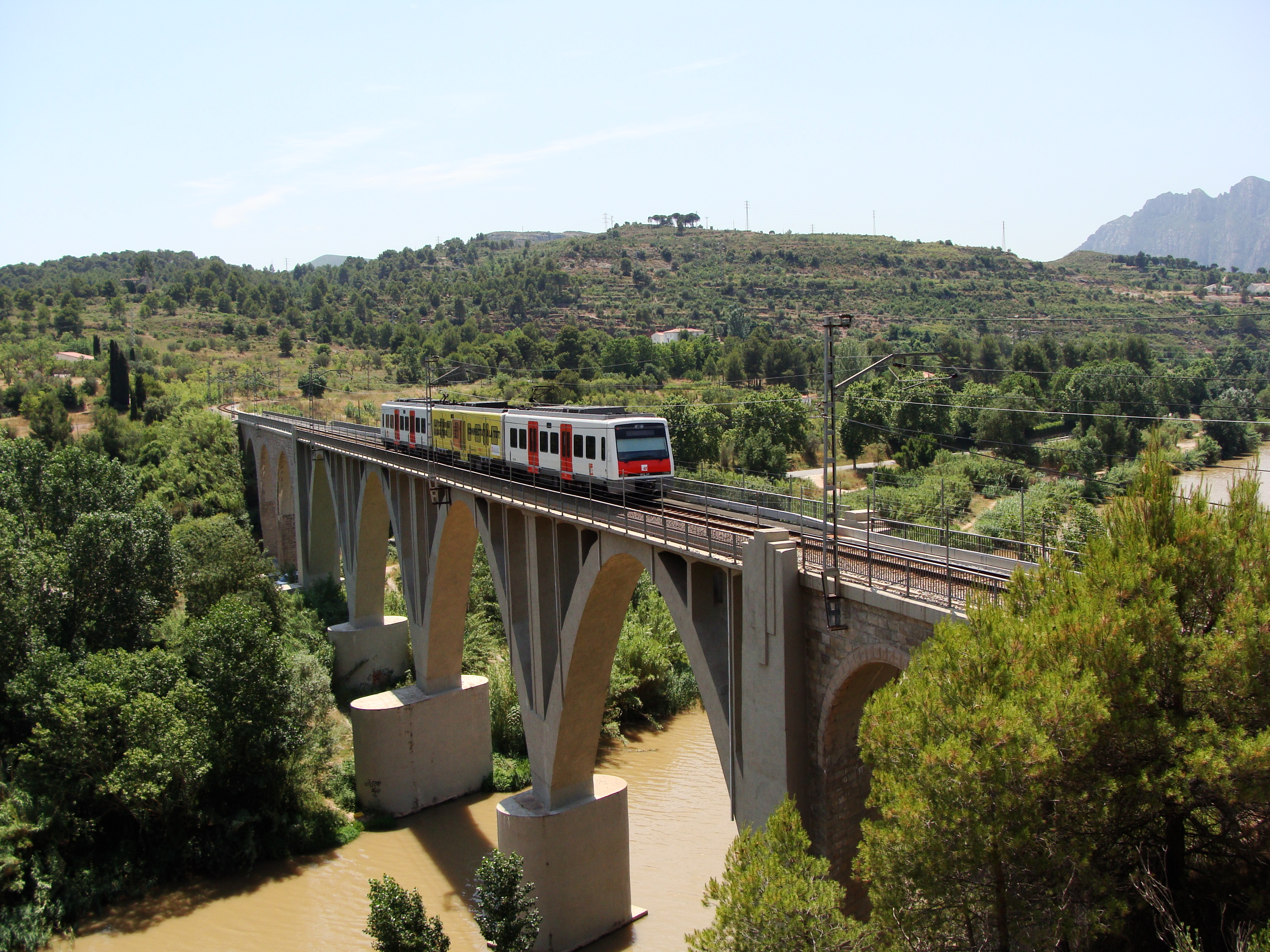 En alguna ocasió ja havia vist, vagons de unitats 213 pintats amb propaganda, però aquesta es la primera vegada que tinc la oportunitat de fotografiar-lo. En aquesta ocasió el lema es, "LA TDT ARRIBA A CASA TEVA, CONNECTAT'T A LA TDT", circulant en direcció Barcelona sobre el pont del riu Llobregat.